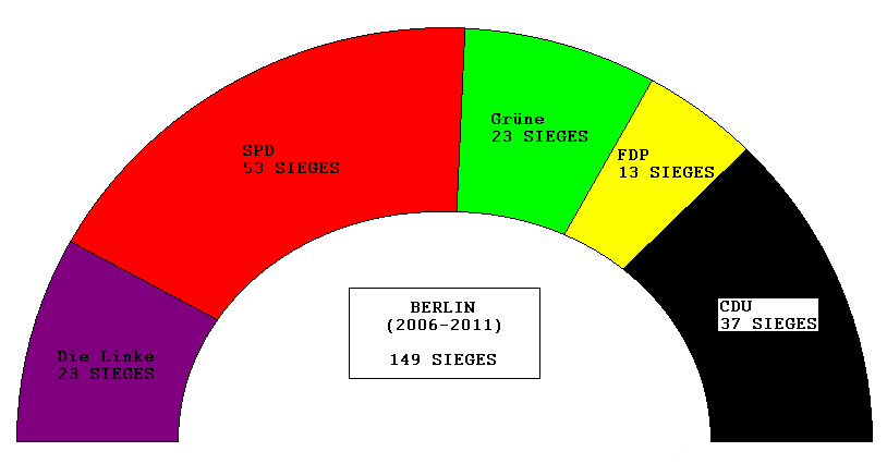 Hémicycle de Berlin entre 2006 et 2011.